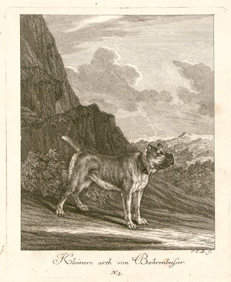 Darstellung eines Brabanter/ kleinen Bären- bzw. Bullenbeißers. Bildunterschrift: "Kleinere arth von Baehrenbeißer. Nr. 3."